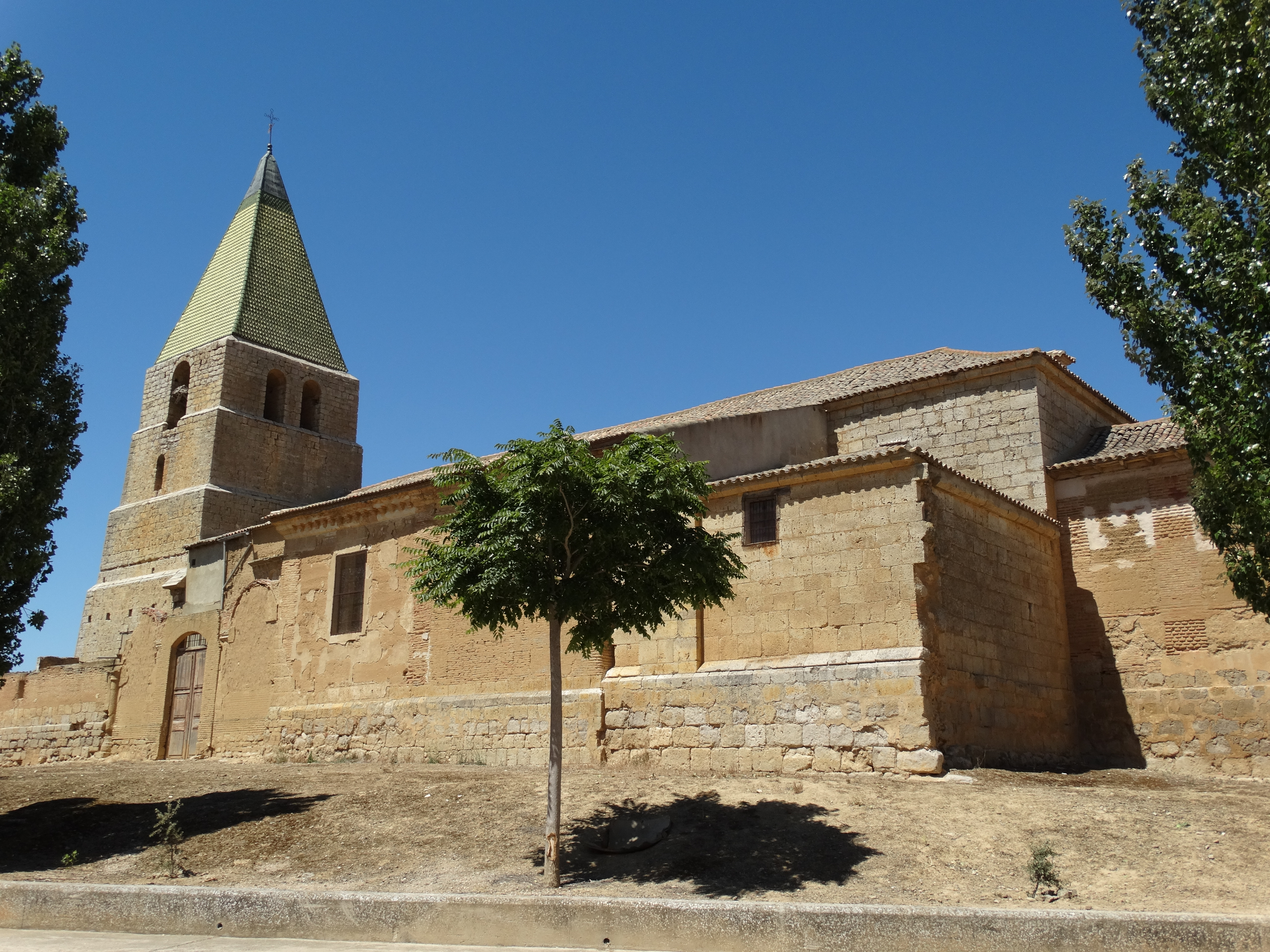 Castromocho, provincia de Palencia (España). Iglesia de Santa María de la Colaña.